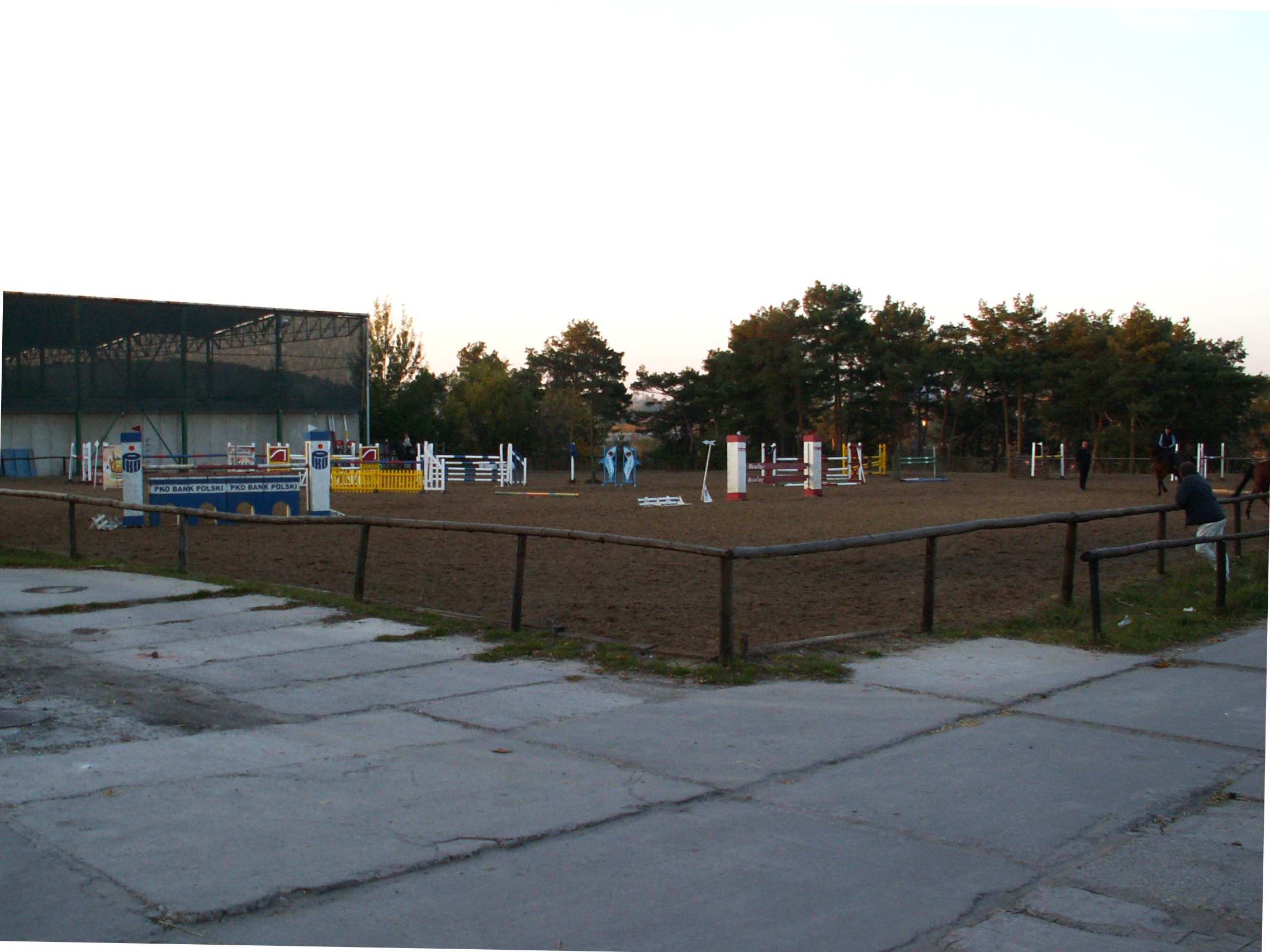 Stadion Leśny w Kielcach